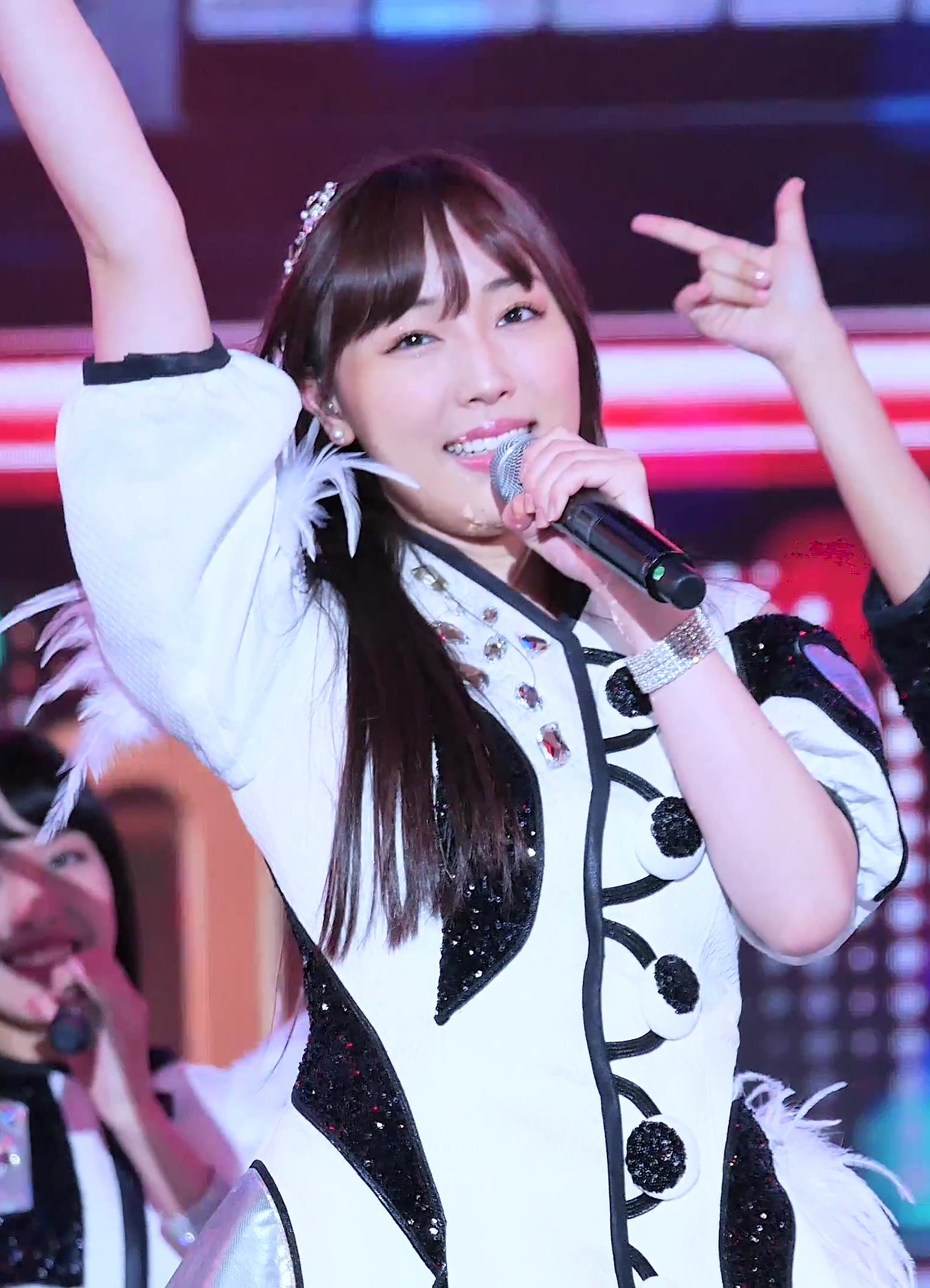 161006 AMN 빅 콘서트 - 후쿠무라 미즈키 우타카다 새터데이나이트 직캠